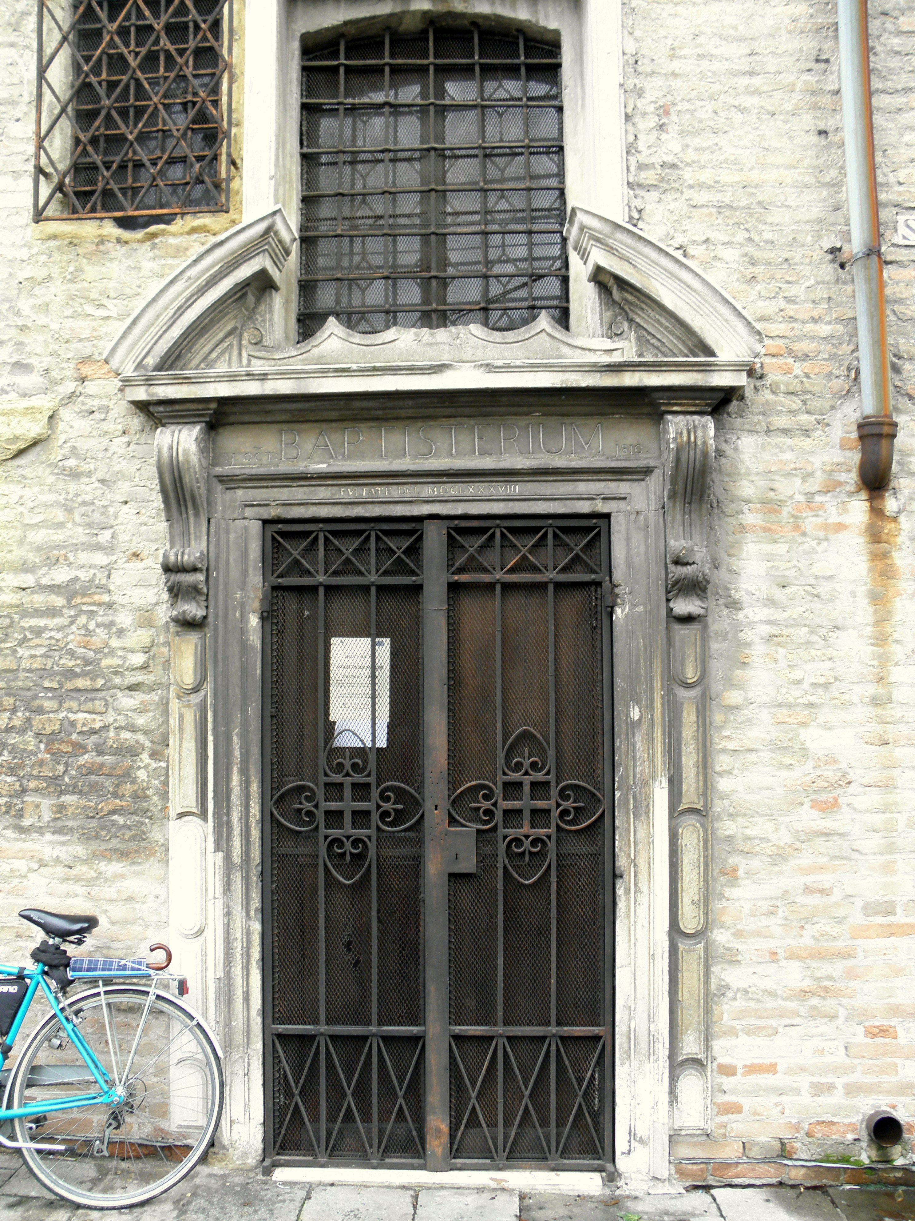 Padova, Basilica e Scuola del Carmine: portale di ingresso alla Scuola del Carmine ed al chiostro.